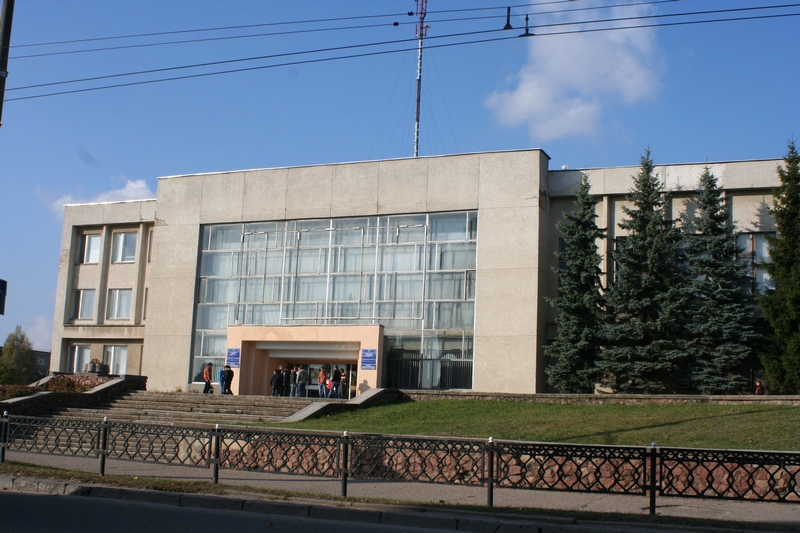 Здание №33 по ул. Врублевского или №21 по ул. Курчатова, Гродно, Беларусь. Здание является корпусом №9 Гродненского Государственного Университета, в нём размещаются: Институт Повышения Квалификации и Переподготвоки Кадров при ГрГУ; библиотека-филиал № 9 сети публичных библиотек г. Гродно.